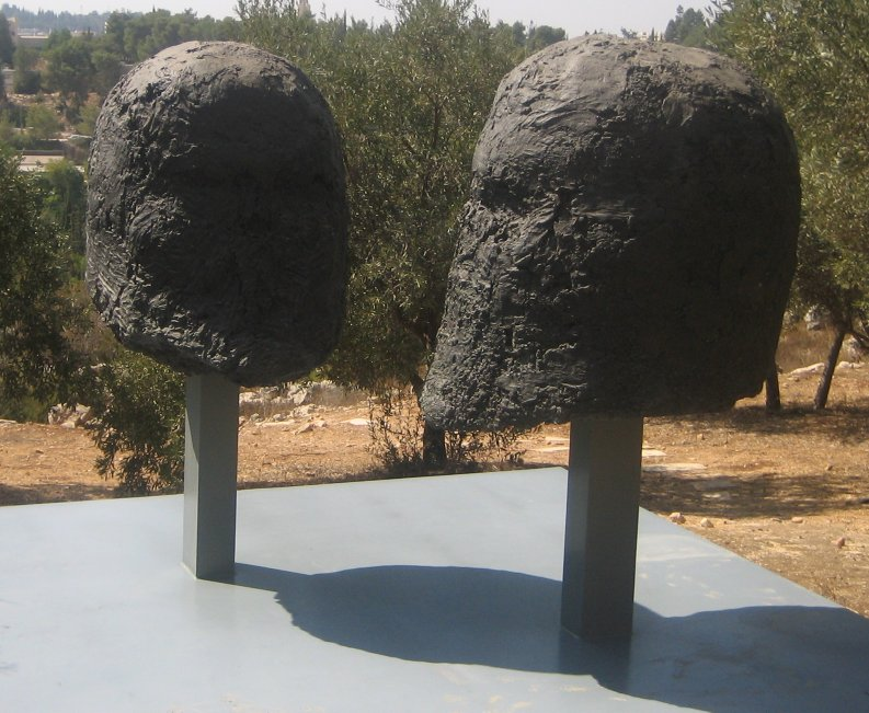 Sculpture